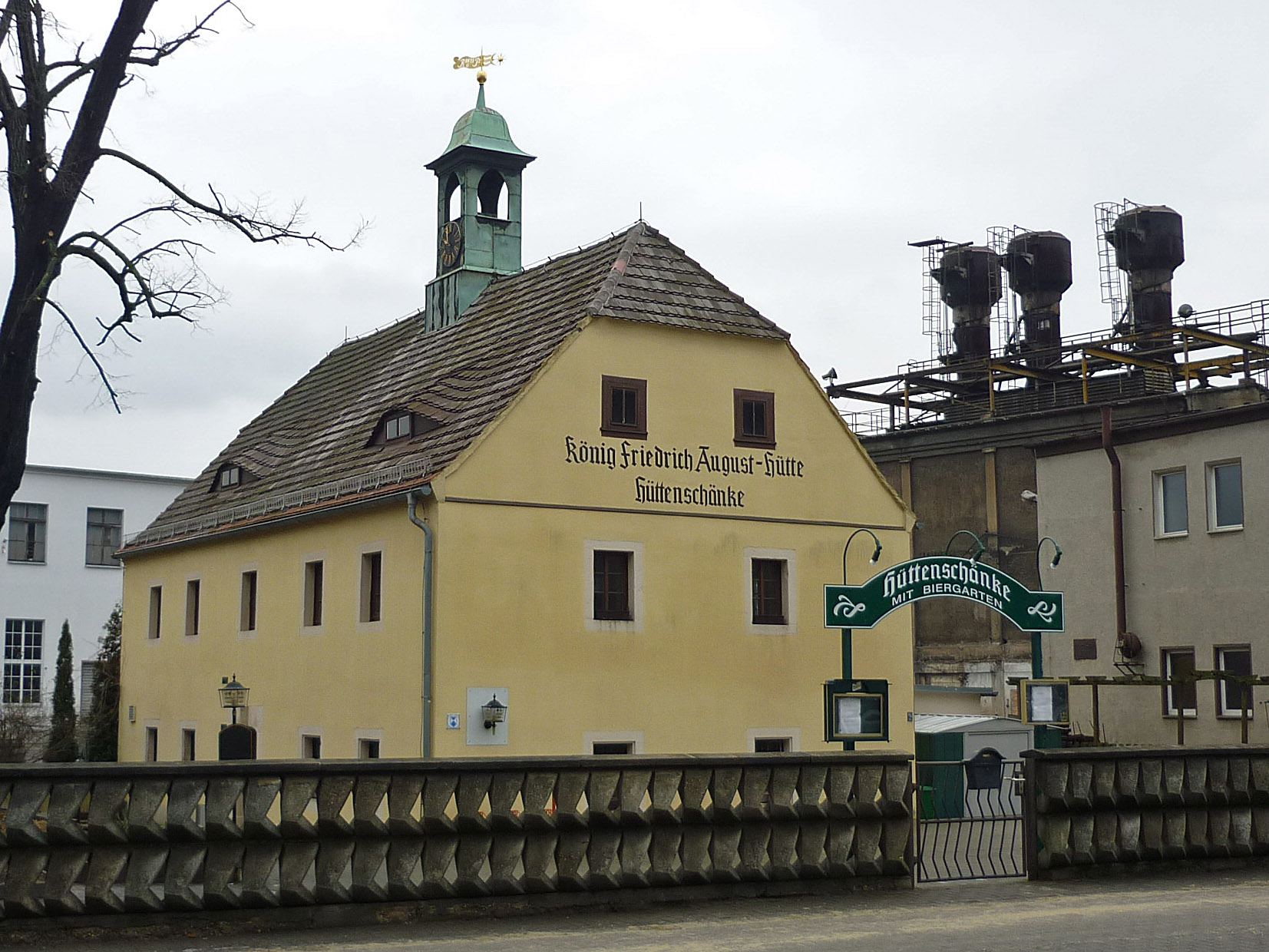 Hüttenschänke der ehem. Friedrich-August-Hütte Tharandter Str. 199 in Dresden-Dölzschen